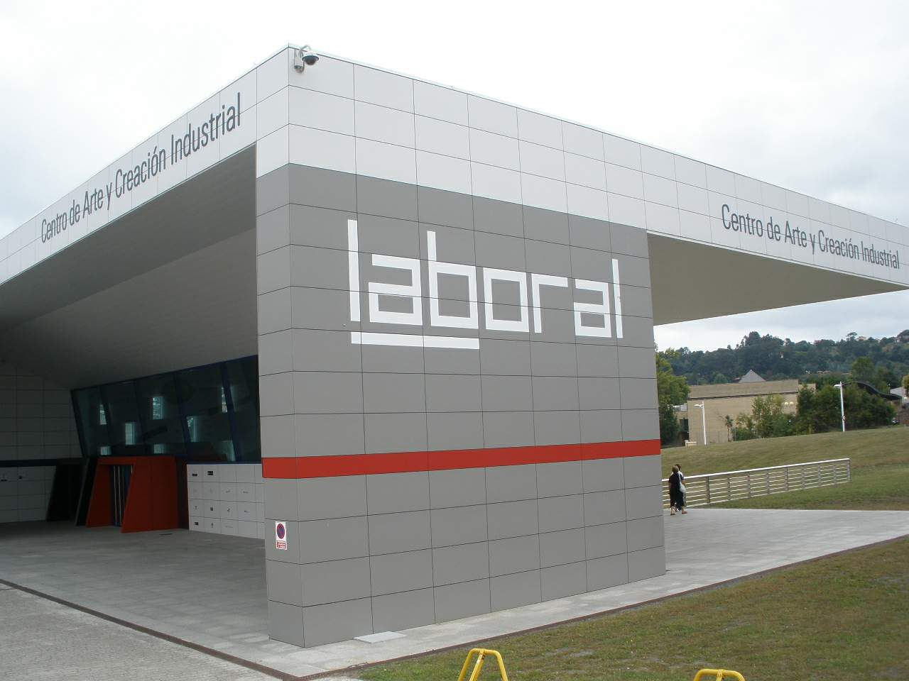 Gijón - Laboral Ciudad de la Cultura (Centro de Arte y Creación Industrial)